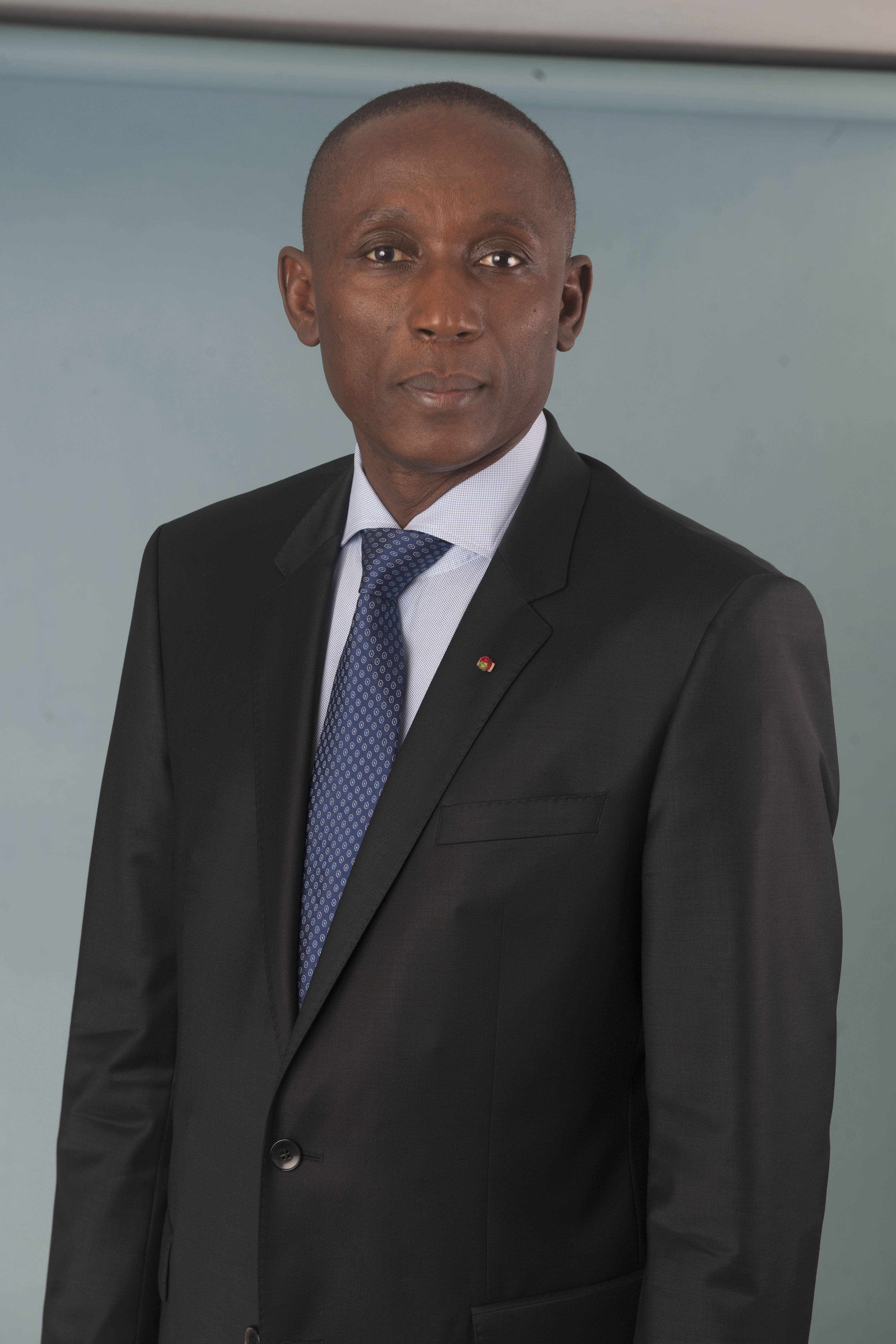 Portrait de Jean-Baptiste Natama